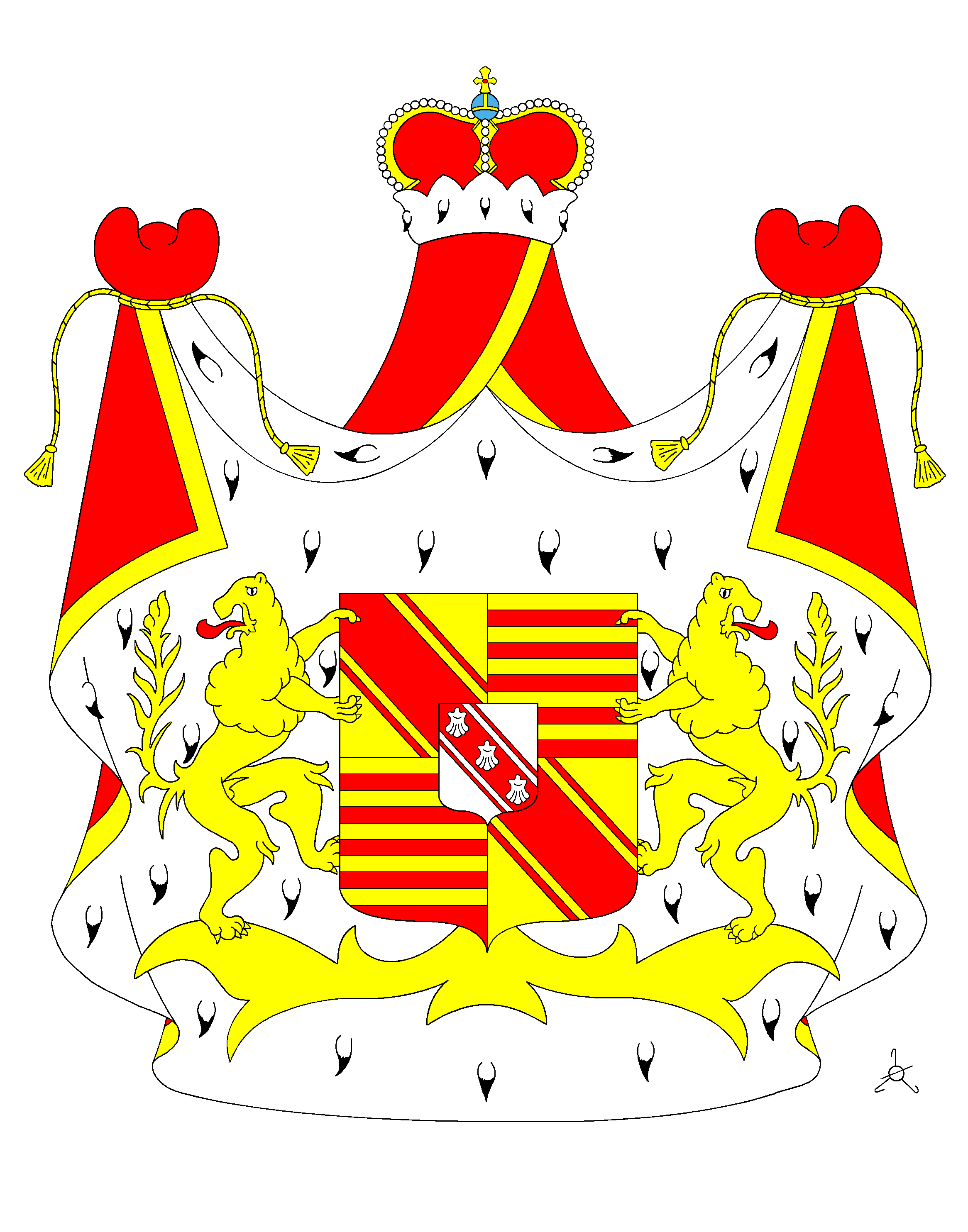 Erb rodu Beaufort-Spontin